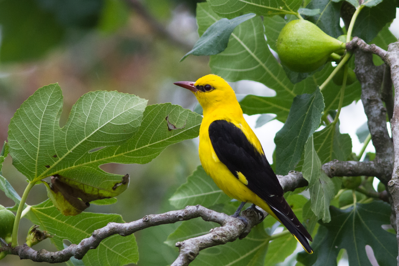 Loriot d'Europe Monsieur